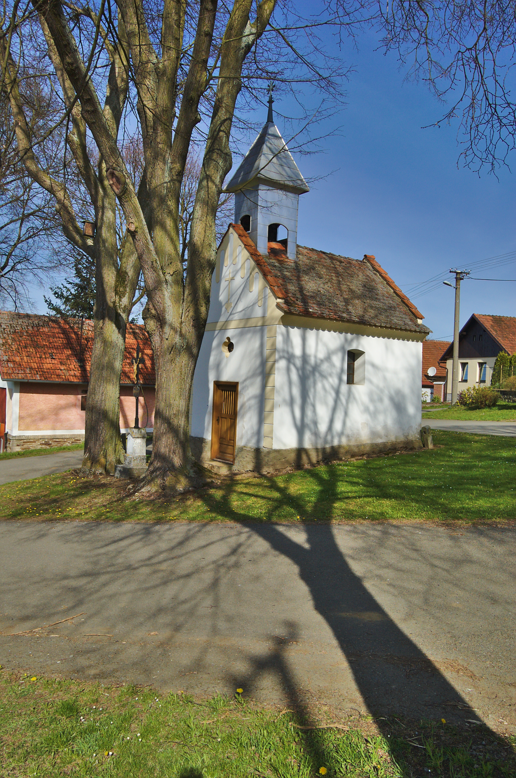 Kaple na návsi, Vysoká Lhota, okres Pelhřimov Project: Fotíme Česko